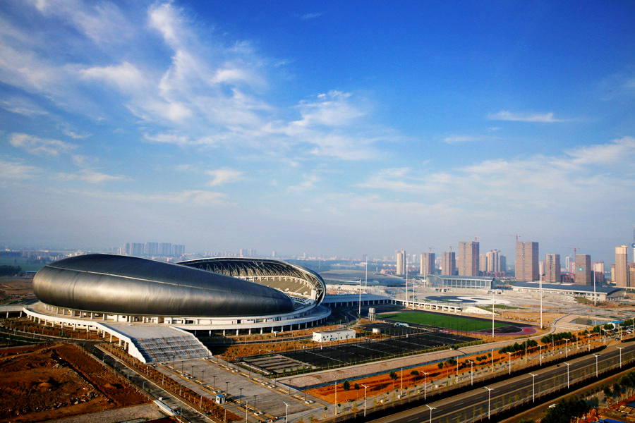 去焦作扫描